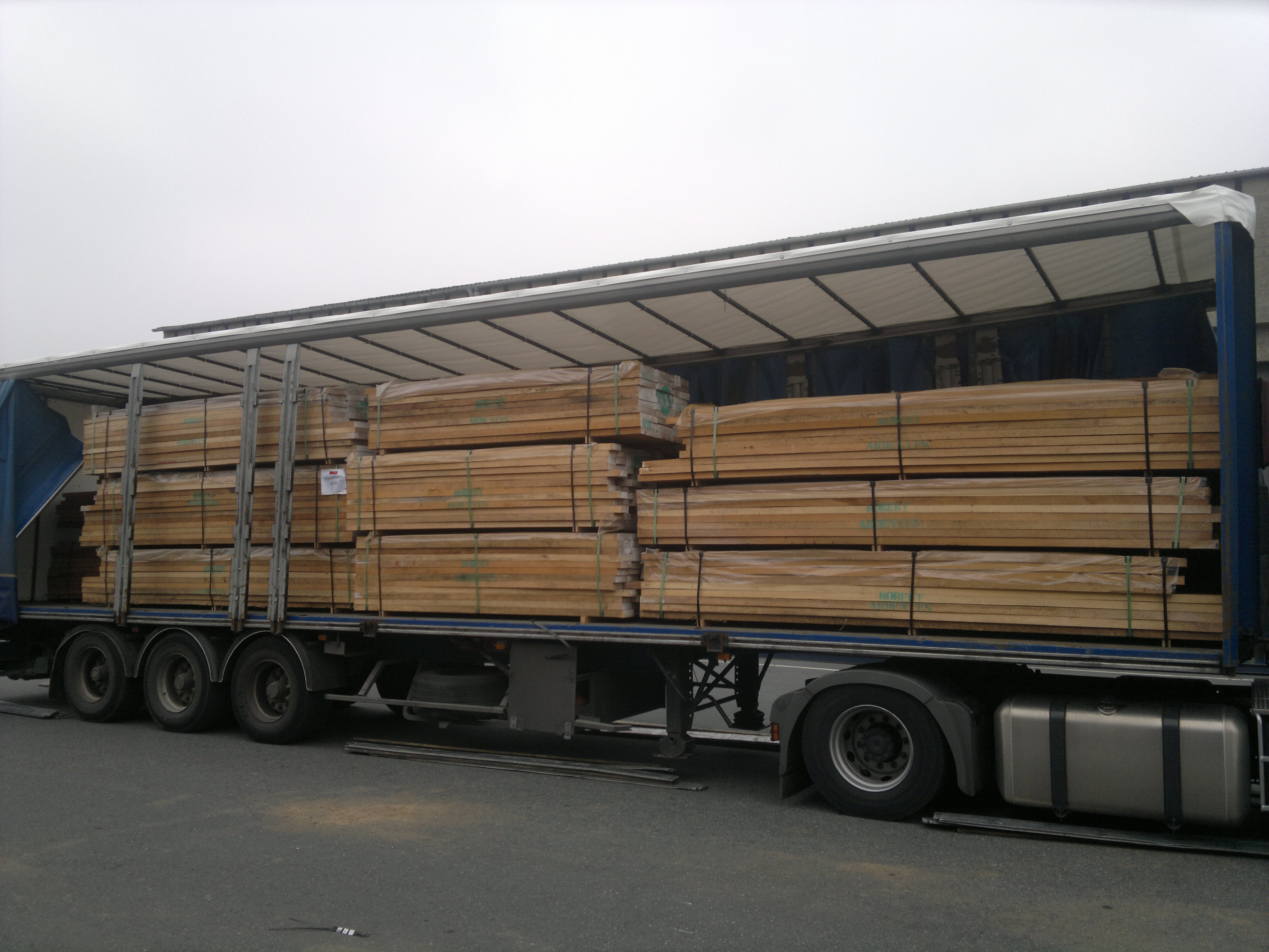 Semi-remorque Tautliner ouverture latérale.